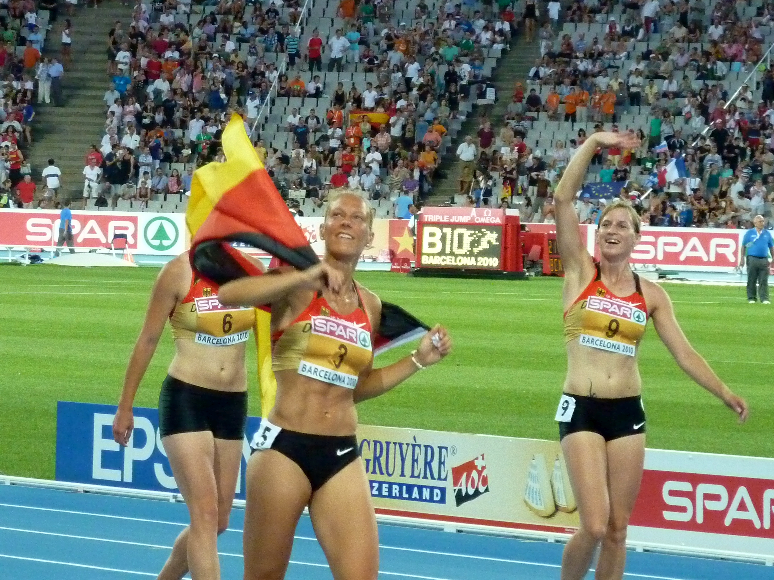 Europameisterschaften 2010 Siebenkampf: Maren Schwerdtner (verdeckt), Jennifer Oeser, Claudia Rath